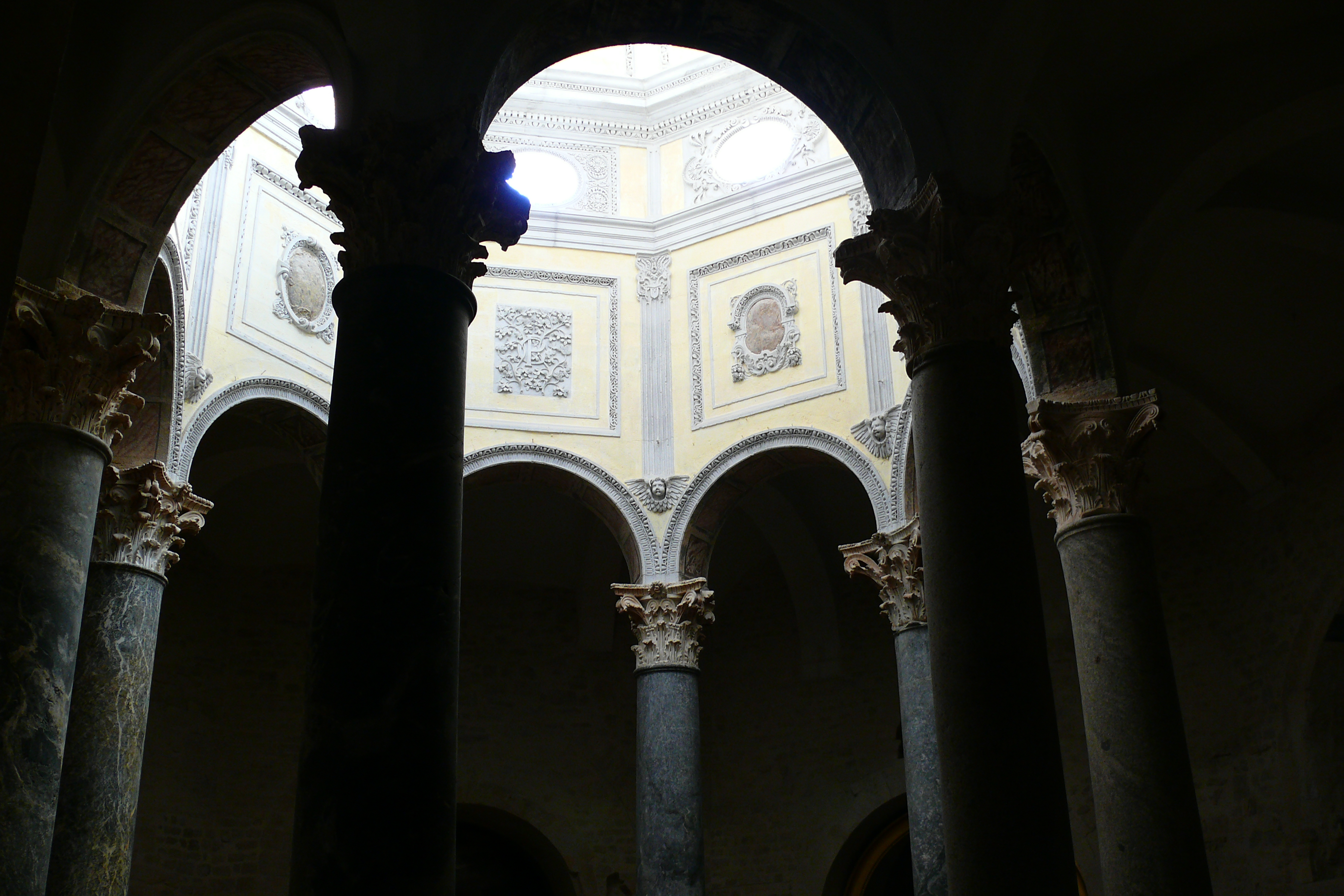 Baptisterium der Kathedrale St.Sauveur